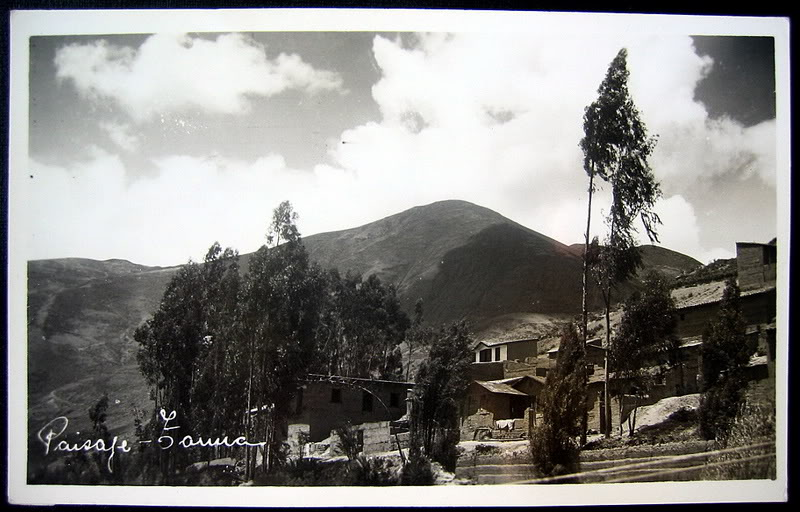 Paisaje de Tarma aprox. 1930-1940